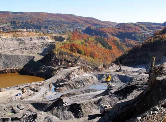 Српски (ћирилица): Површински коп „Северни ревир“